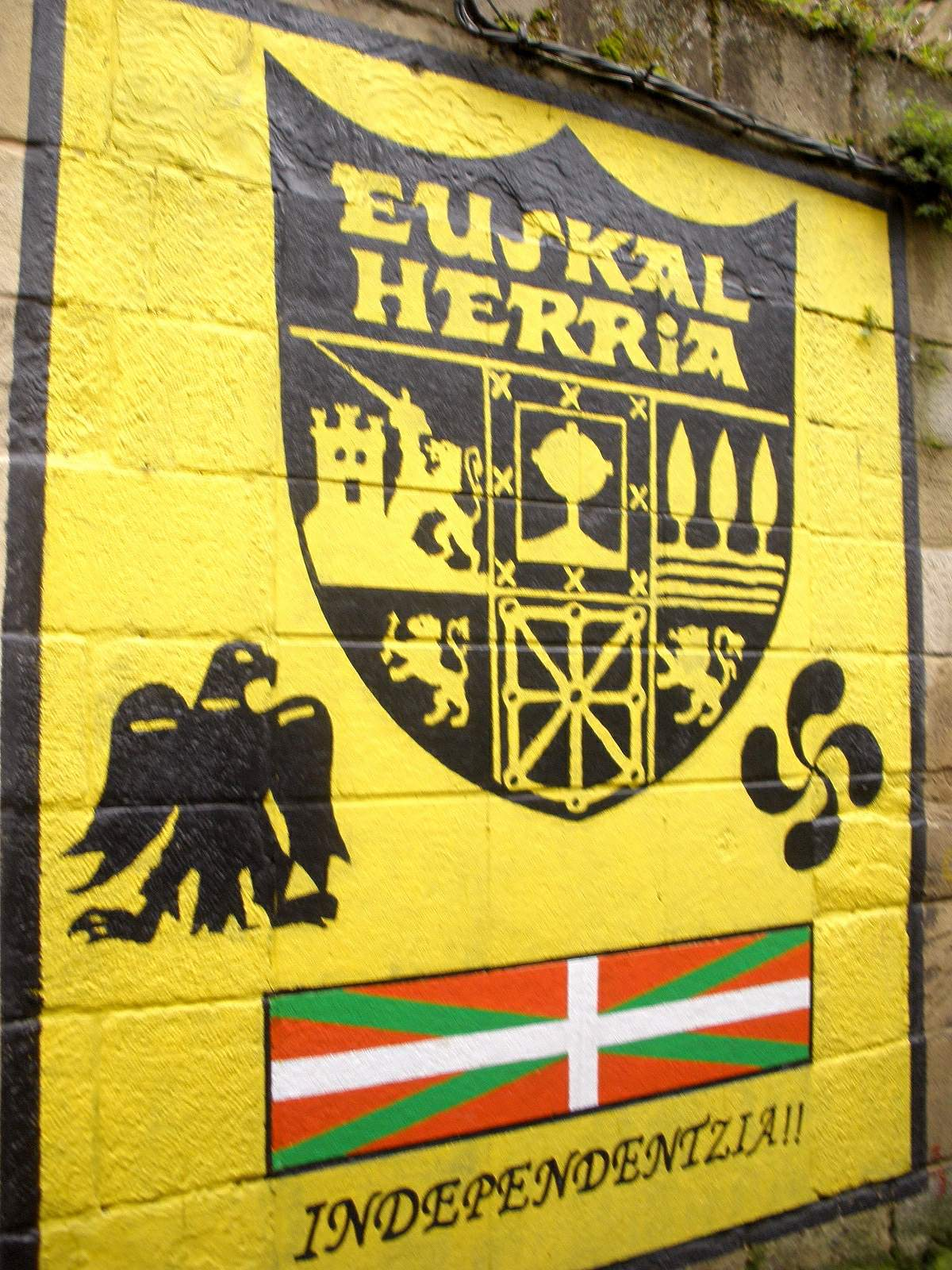 Pasajes de San Juan (Gipuzkoa)